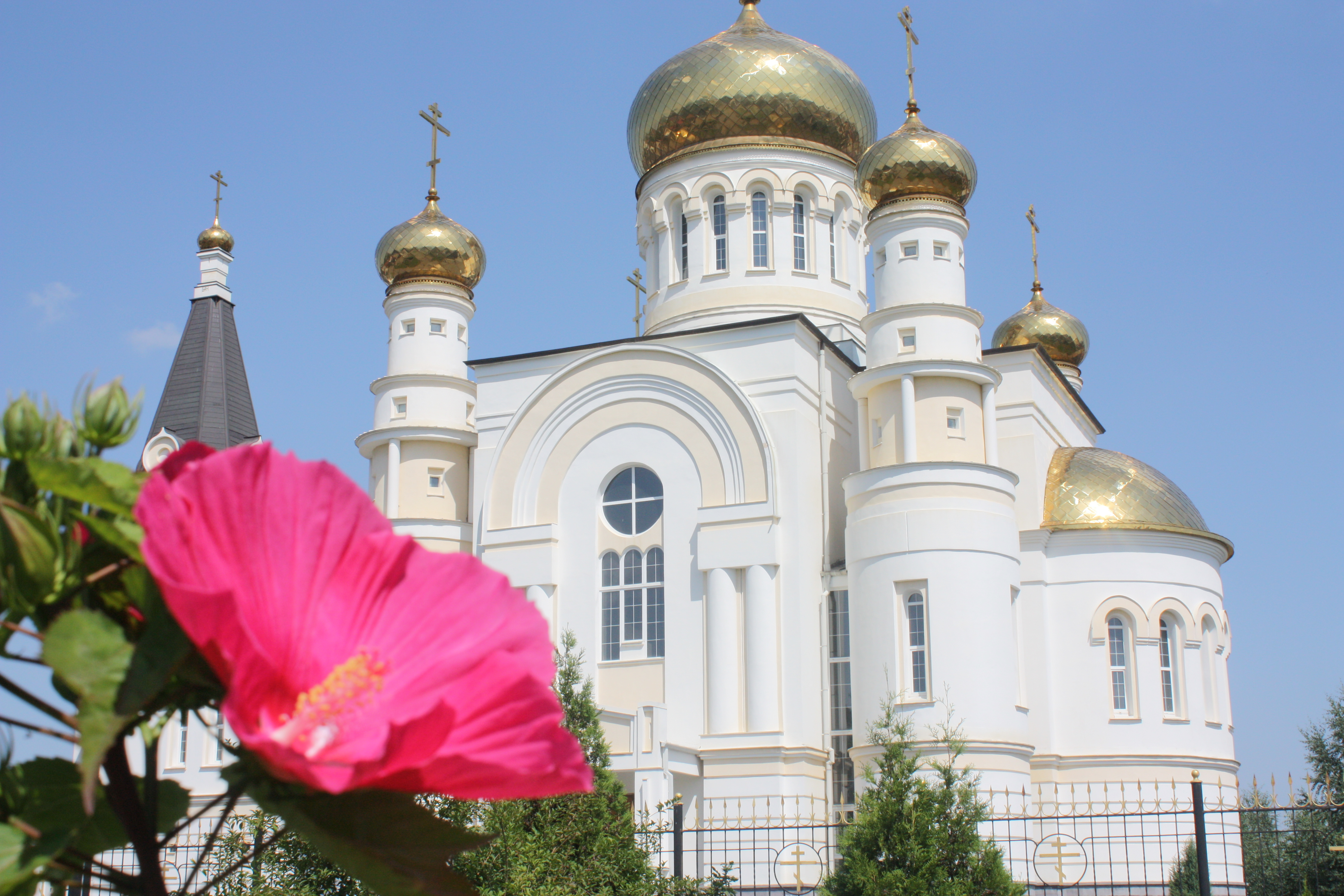 Catedral de San Jorge (Vladikavkaz) Catedral de San Jorge el Victorioso - la iglesia ortodoxa en Vladikavkaz. La segunda iglesia, después de San Andrés, en Stavropol, donde se encuentra el Departamento del arzobispo de Stavropol y Vladikavkaz Feofan.